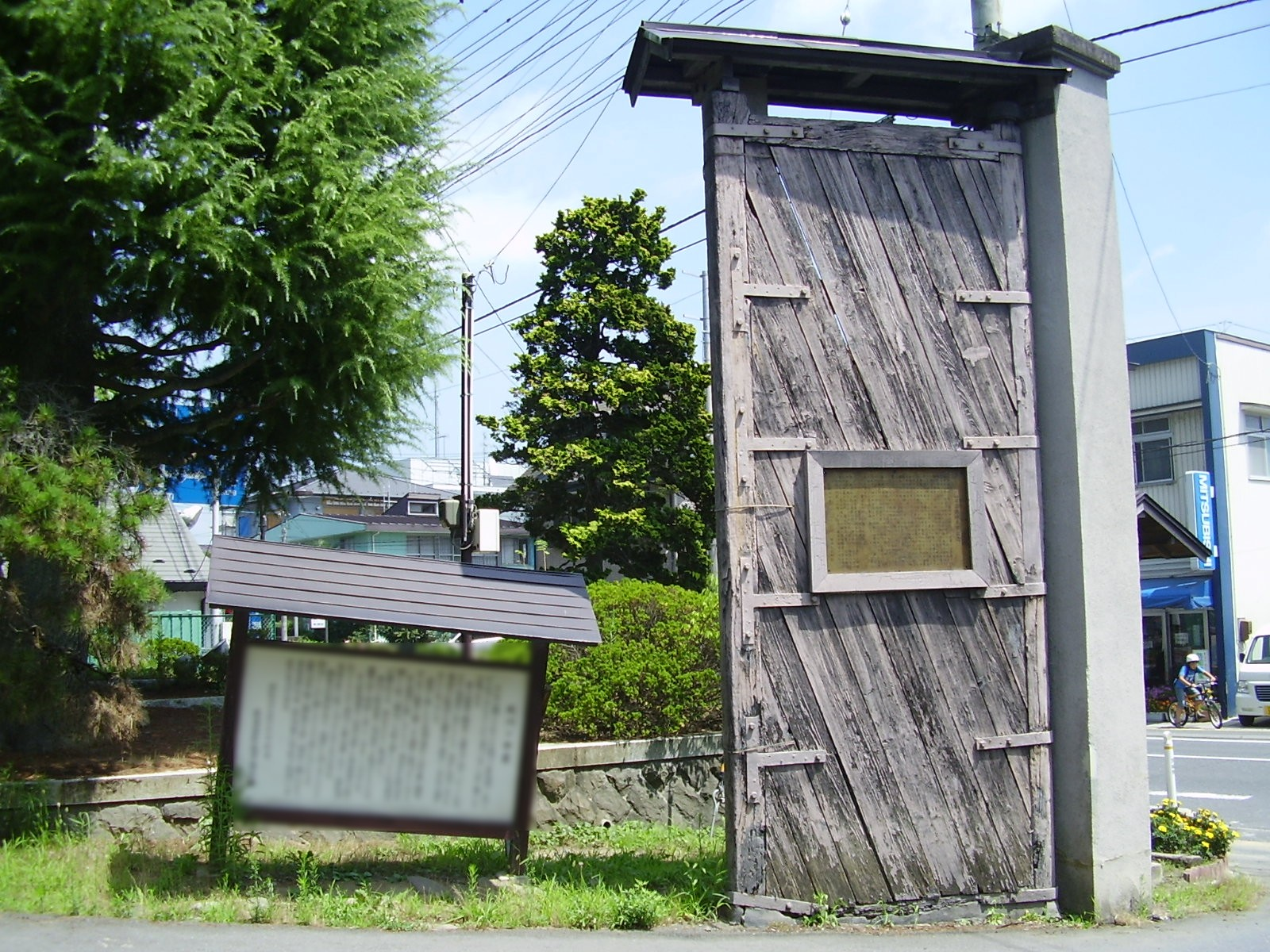 宮城県大崎市立鹿島台小学校の校門。品井沼干拓事業で松島村に設置された小川閘門の名残で、鹿島台村の村長であった鎌田三之助によってこの地に移築された。撮影日 2011年8月9日※著作権に抵触する恐れのある箇所は画像処理をしています。